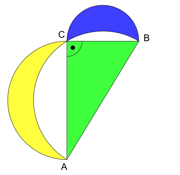 Möndchen des Hippokrates